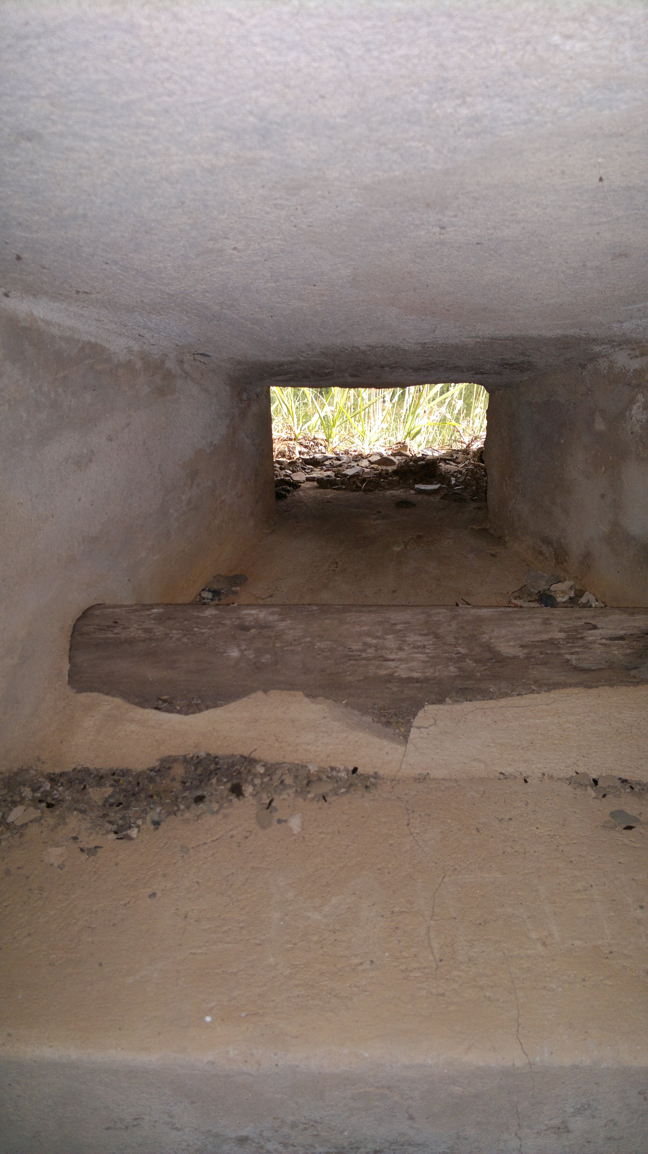 Para colocar las armas